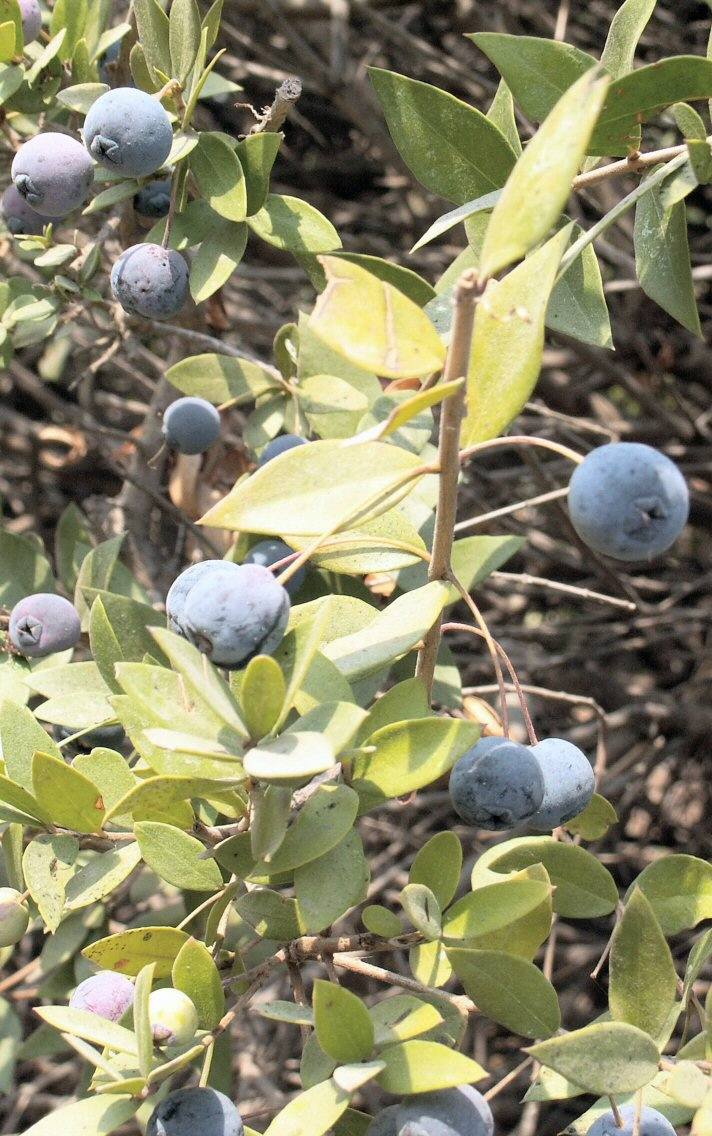 Myrtus fruits.